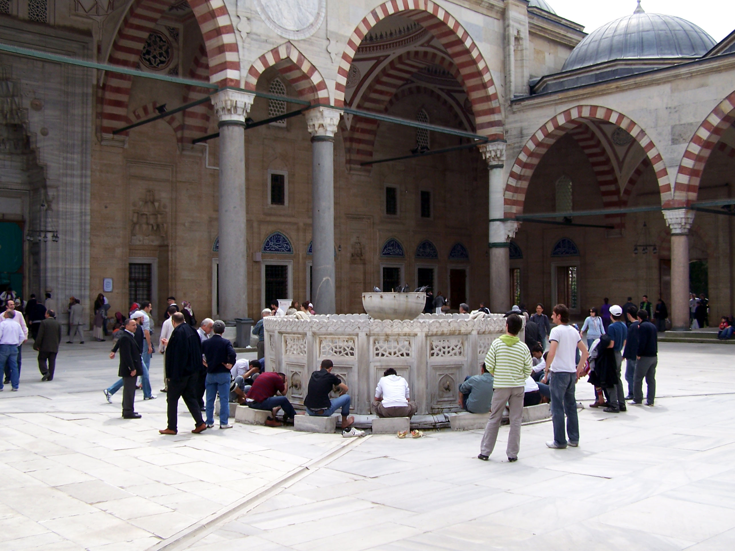 Şadırvan in courtyard of Selimiye Camii Mosque - in Edirne - Turkey.